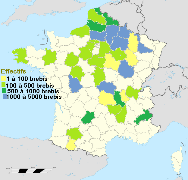 Répartition départementale des brebis Ile de France soumises au contrôle des performances en 2009. Données de l'Institut de l'Élevage-Département de génétique publiées en 2010